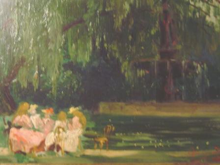 Jardí